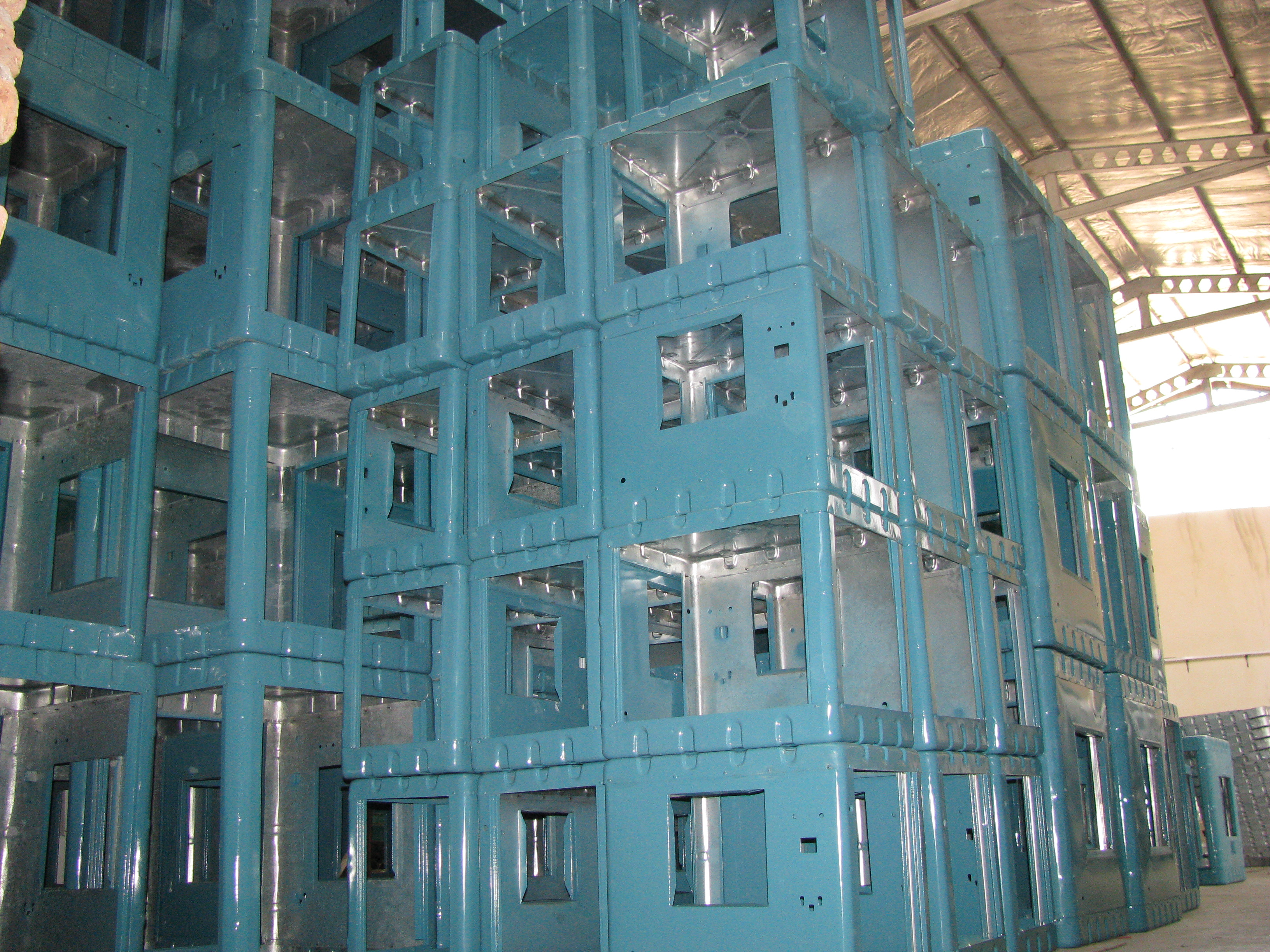 کارگاه صنعتی در کوجوار